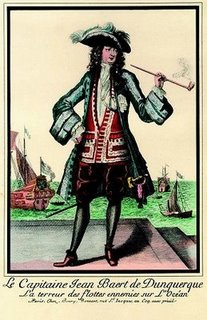 Le corsaire français Jean Bart, par R.-B. Bonnard, Gravure du XVIIème siècle, Bibliothèque nationale de France, Paris